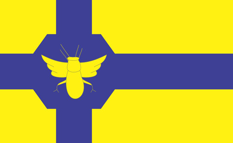 Bandeira do município de Mombuca.